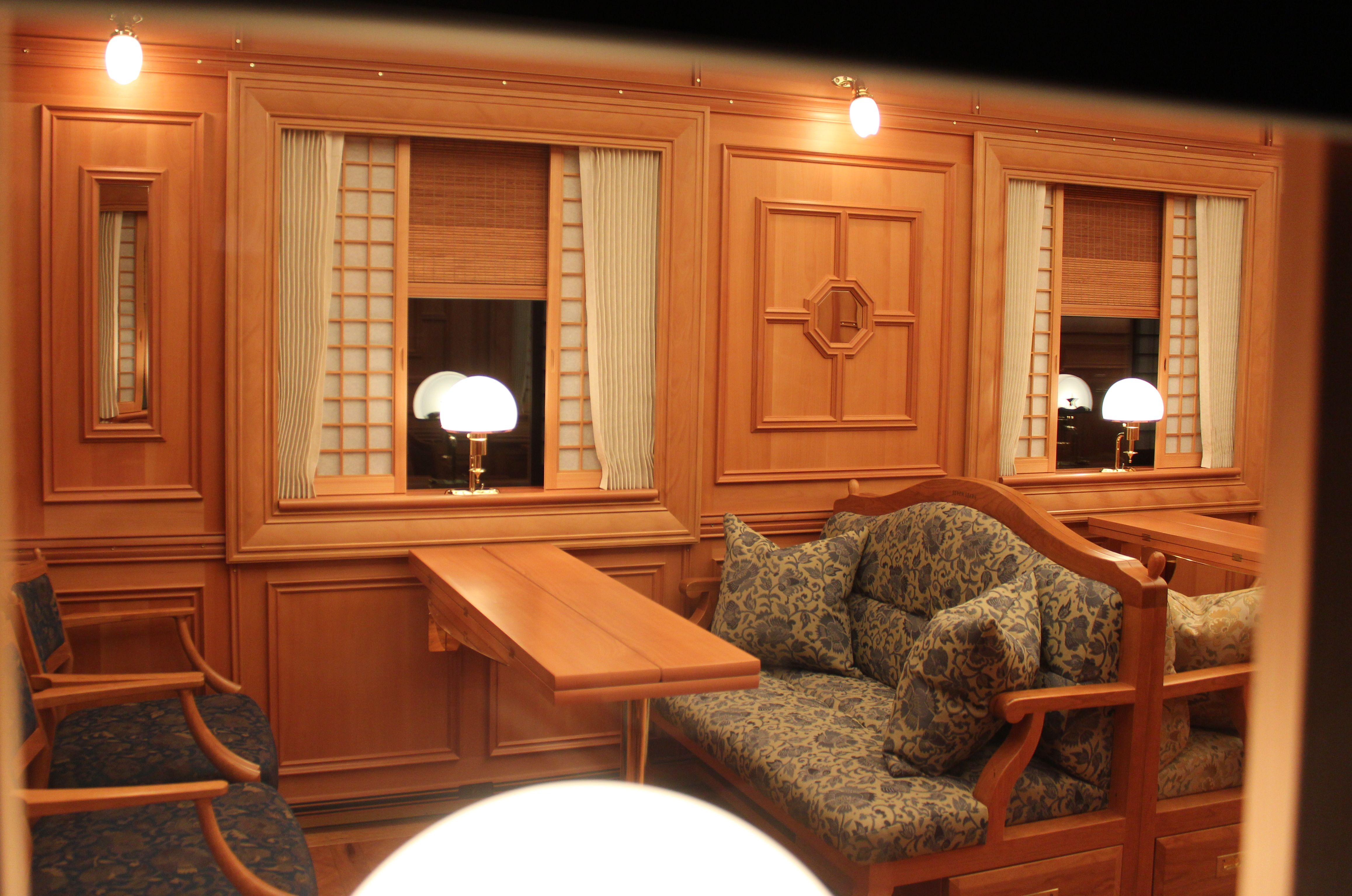 ななつ星in九州 マシフ77-7002 内部 ダイニングスペース